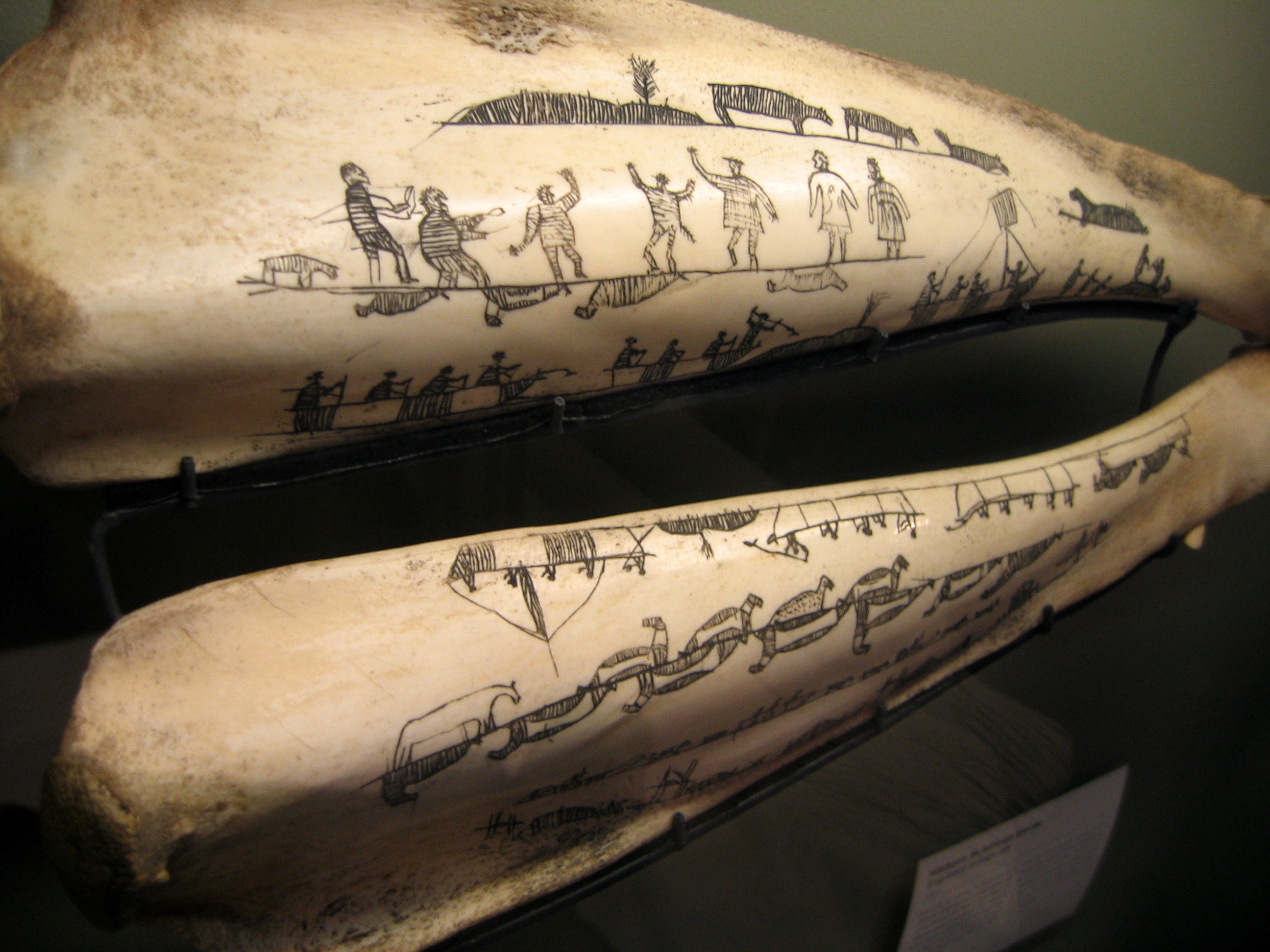 Une mâchoire de bélouga gravée